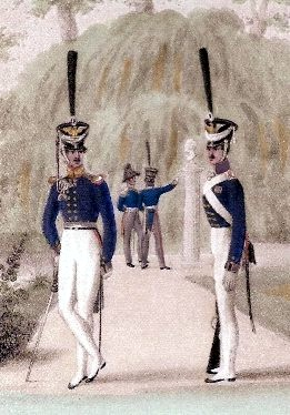 GGrenR1 1824 Offizier und Grenadier